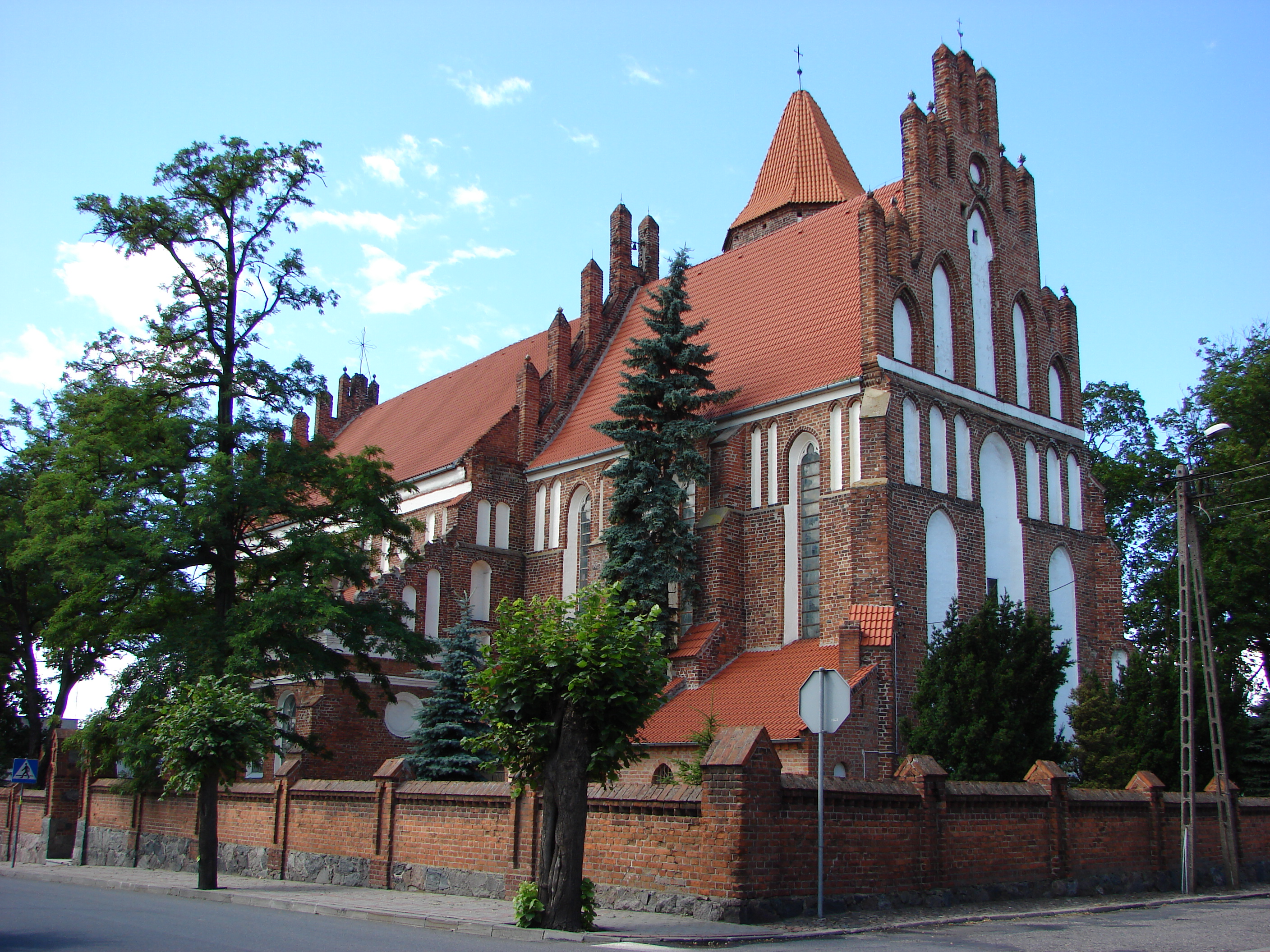 Radzyń Chełmiński, kościół św. Anny.